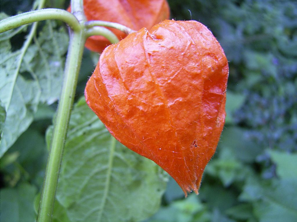 in de serie onze tuin